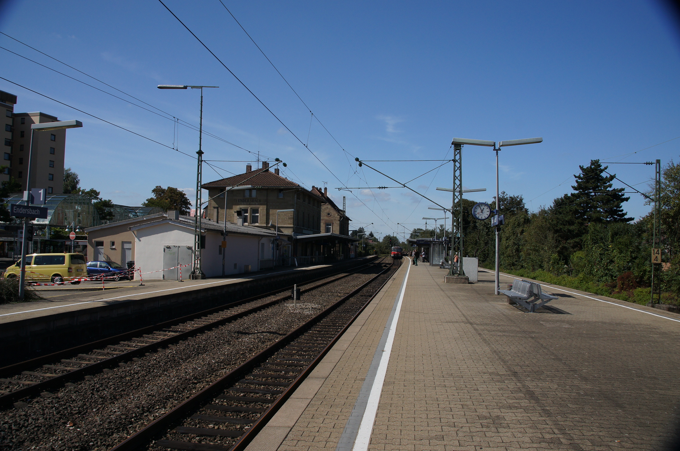 Bahnhof Endersbach